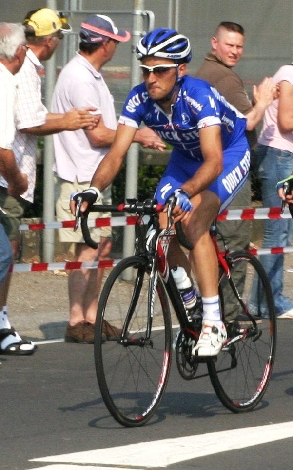 De Carlos Barredo op der Kopp vum Sart-Tilman Liège-Bastogne-Liège 2007.